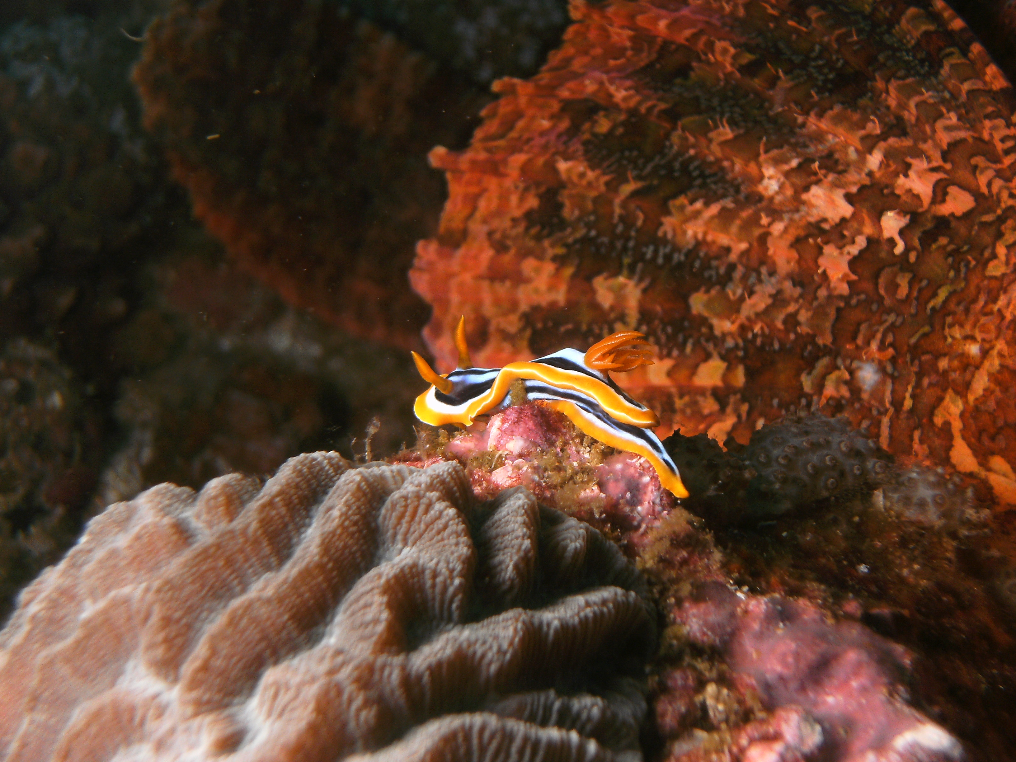 Nudibranche Chromodoris magnifica sur fond de Poisson-Scorpion à 40 mètres de fond